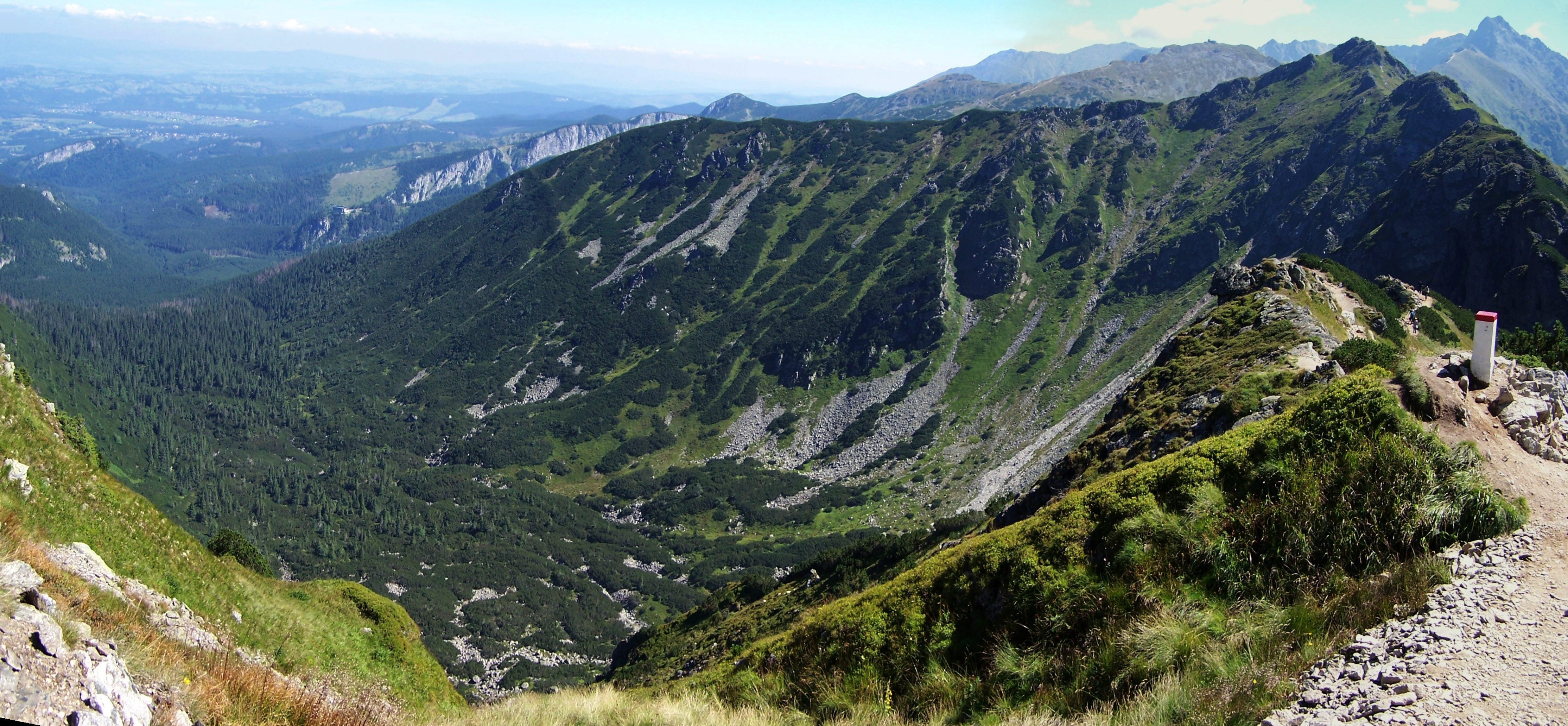 Dolina Sucha Kondracka, widok z głównej grani